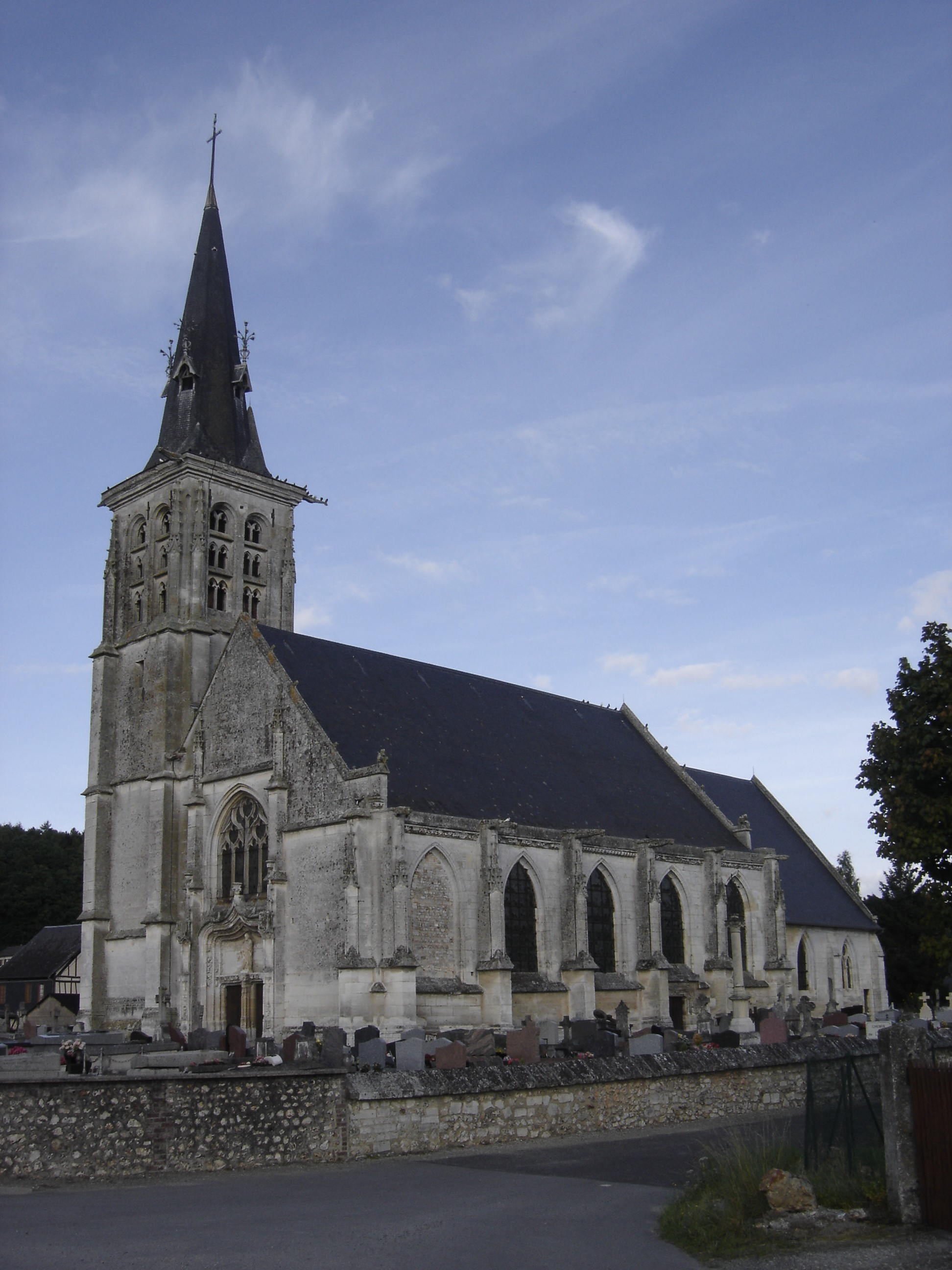 Eglise d'Appeville-Annebault - Eure - France